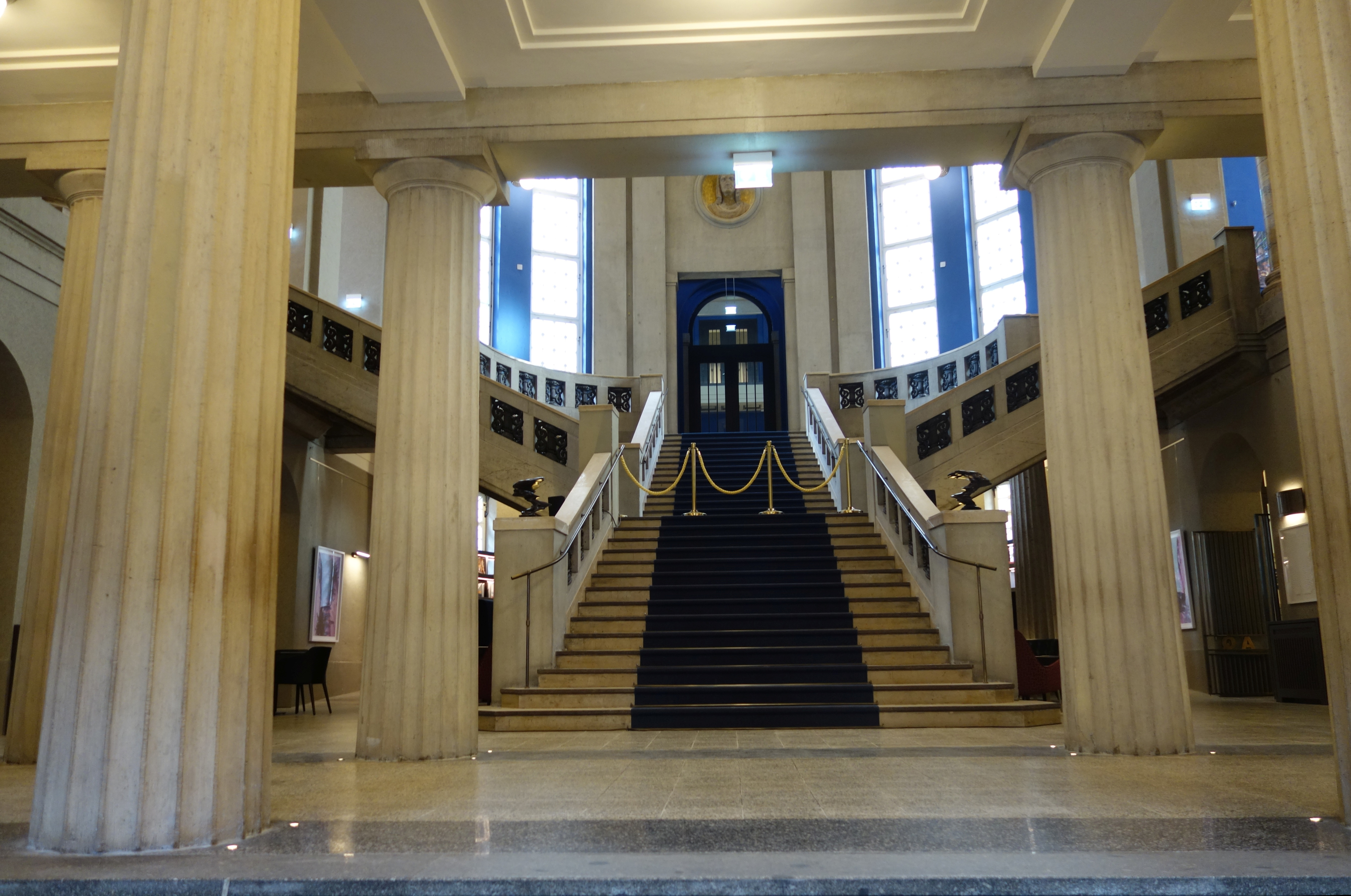 Düsseldorf, Andreas Quartier, die Eingangshalle.